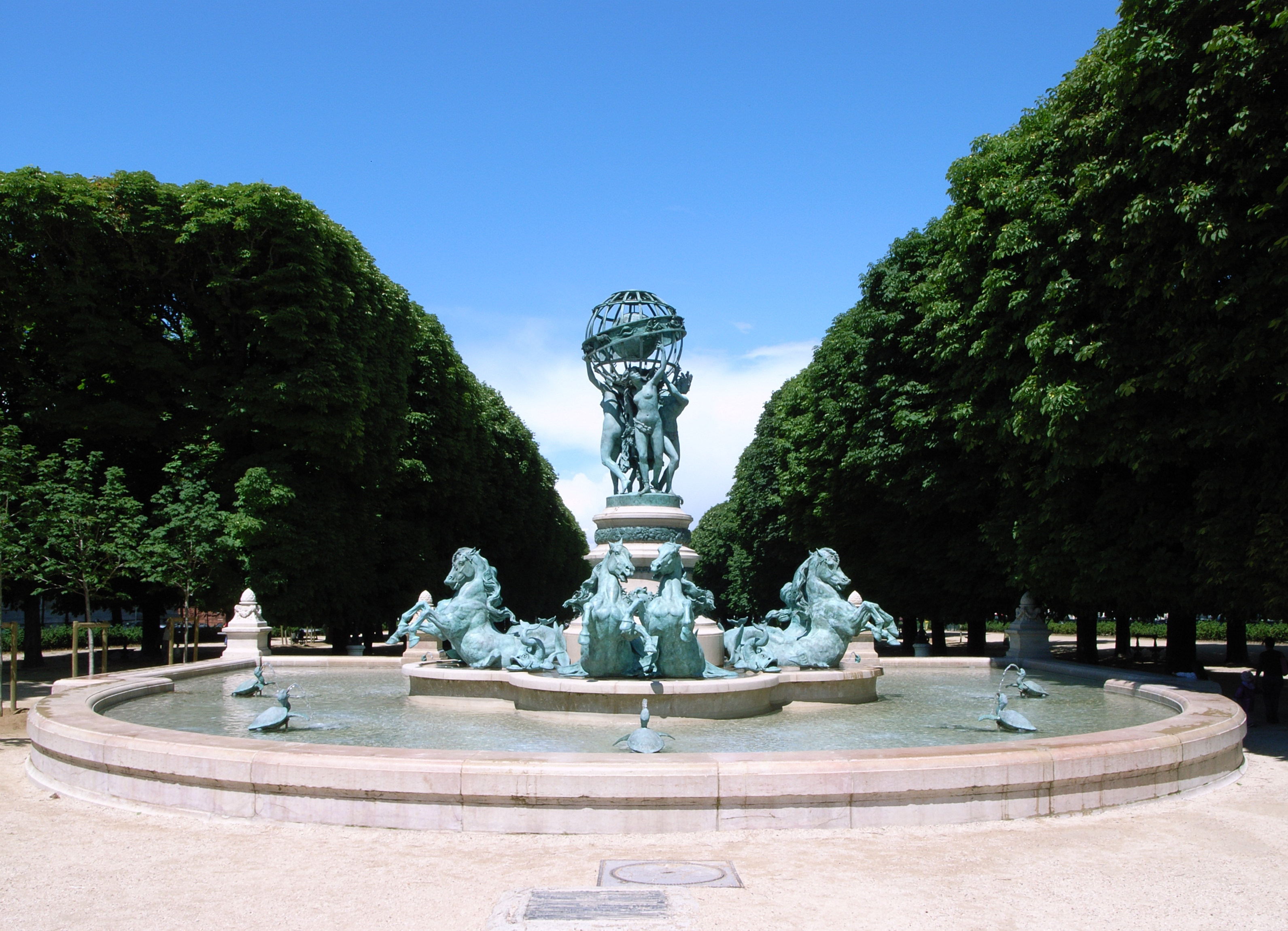 Fontaine de l'Observatoire (1873) by Gabriel Davioud, Paris